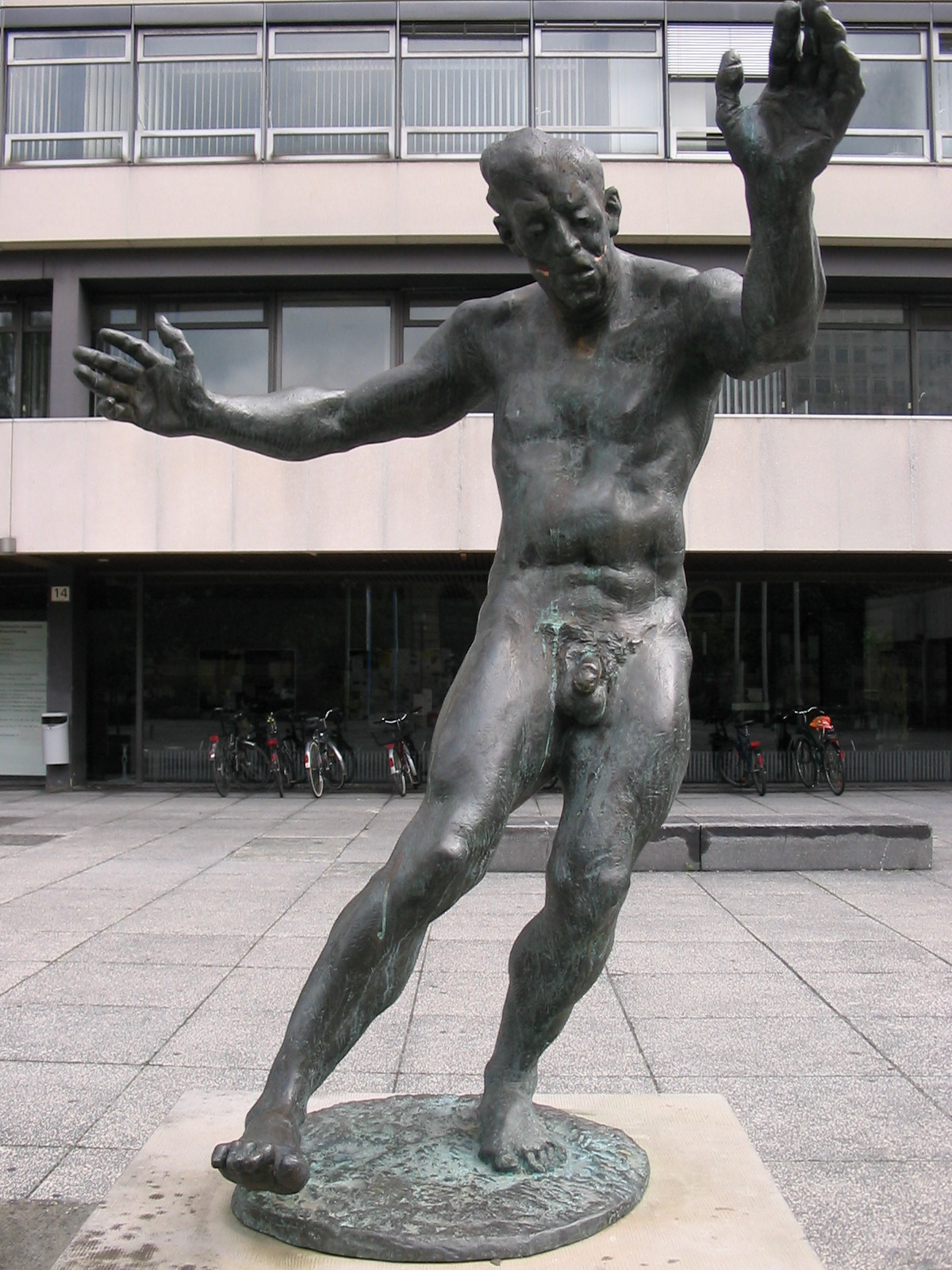 Braunschweig Dionysos Statue